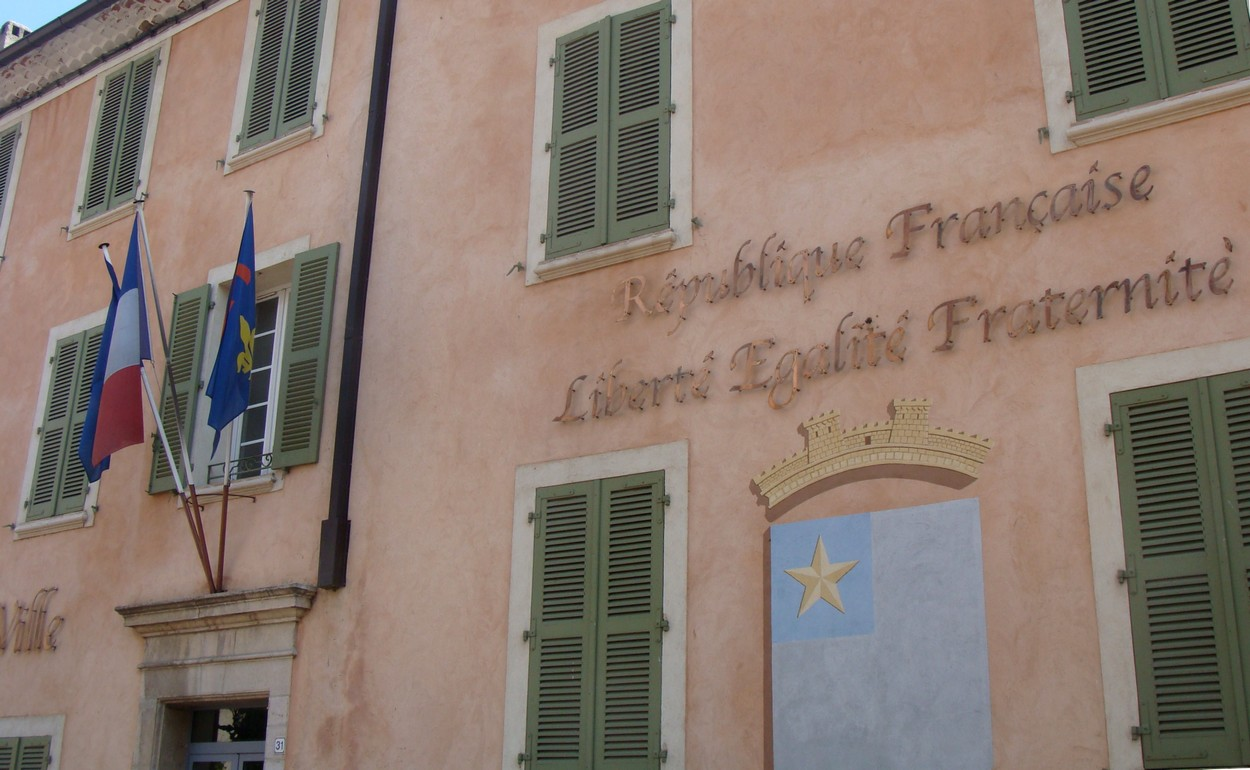 Carcès (Var) : la mairie.